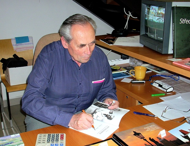 Ivo Mička v Nové síni Rabasovy galerie v Rakovníku (foto Jiří Pokorný)